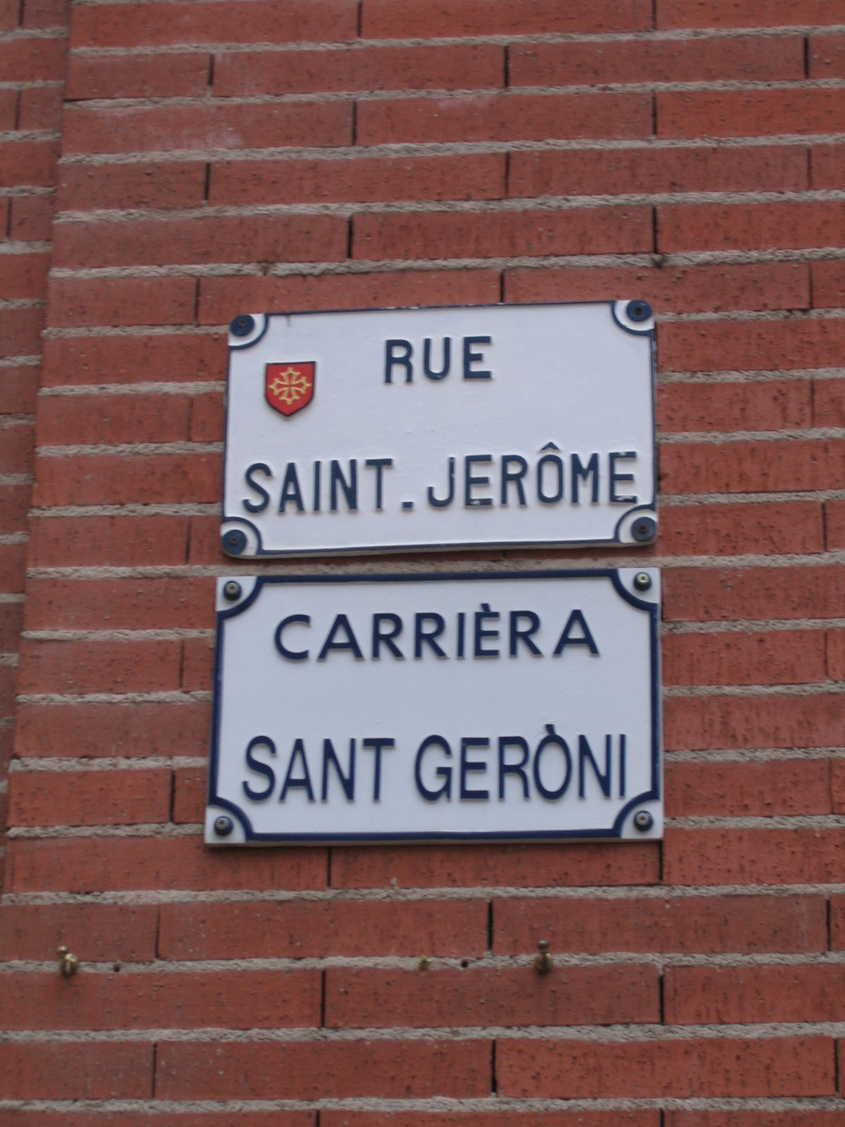 Panneau bilingue Français-Occitan à Toulouse. Rue Saint Jérôme / Carrièra Sant Geròni.